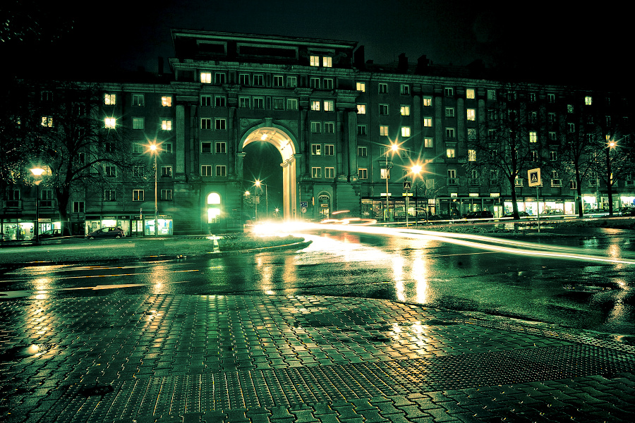 Ostrava Poruba hlavní třída